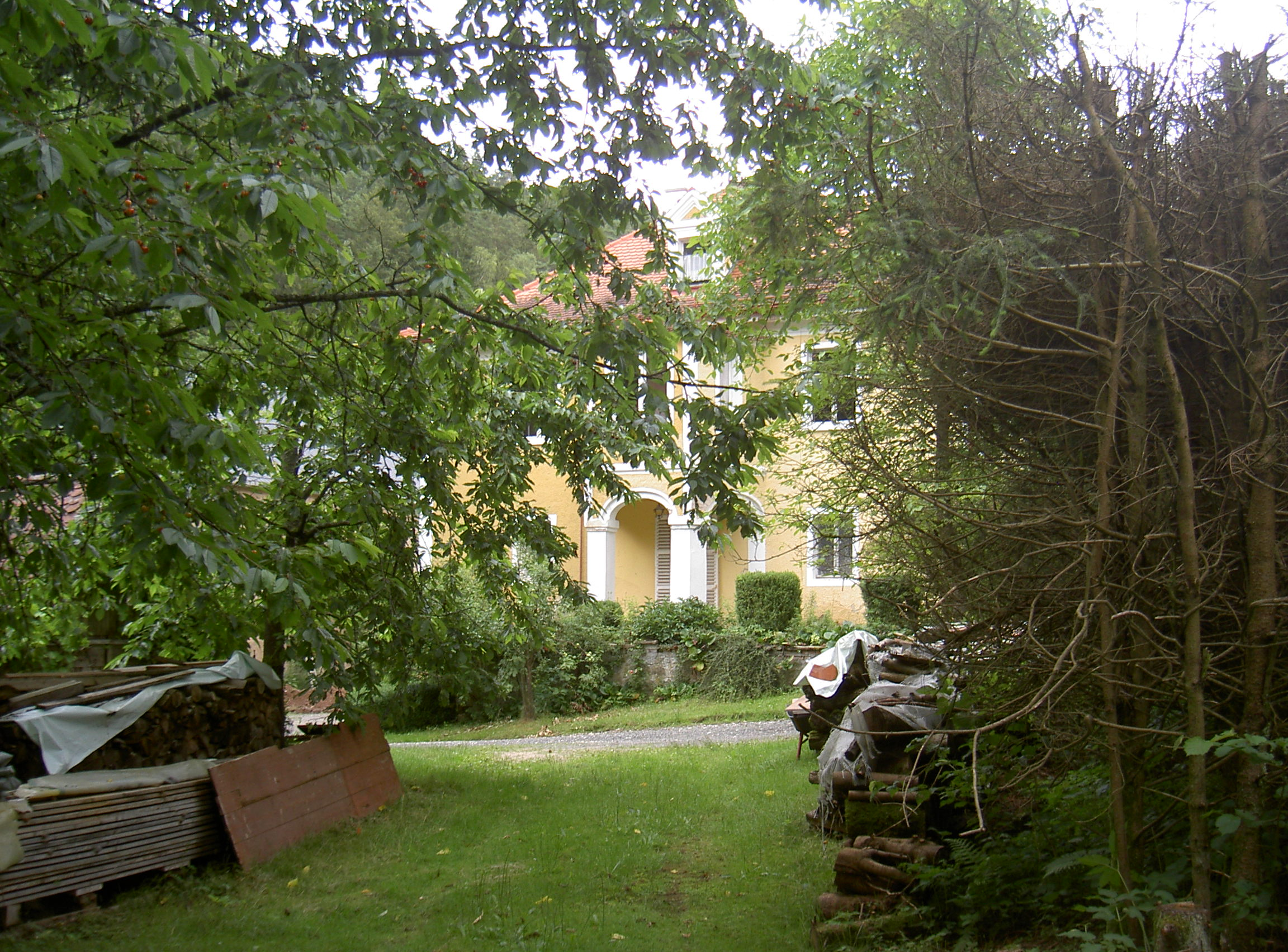 Glasschleife Mittermurnthal